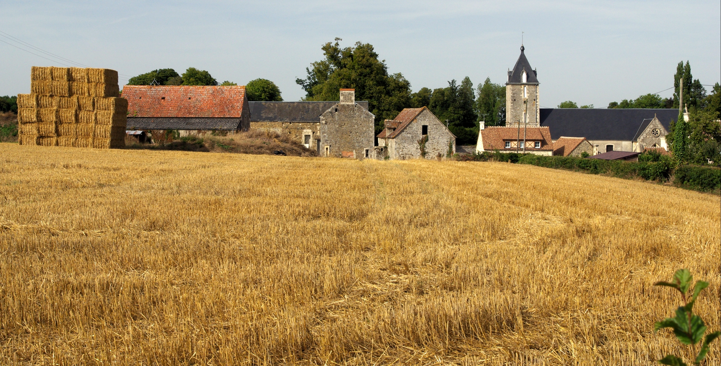 Partie du village et son église.